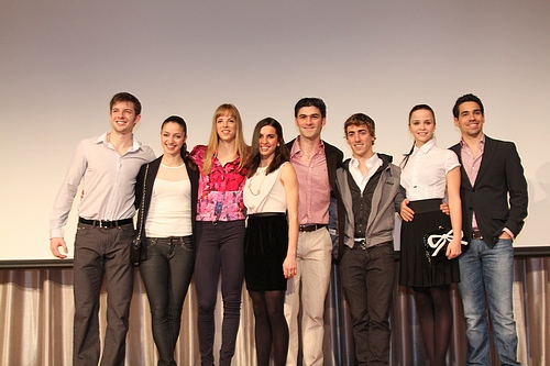 Команда Италии на командном чемпионате мира по фигурному катанию 2012. Слева на право:Ондржей Готарек, Стефаи Бертон, Каролина Костнер, Валентина Маркеи, Самуэль Контести, Паоло Бакини, Анна Каппелини, Лука Ланотте.